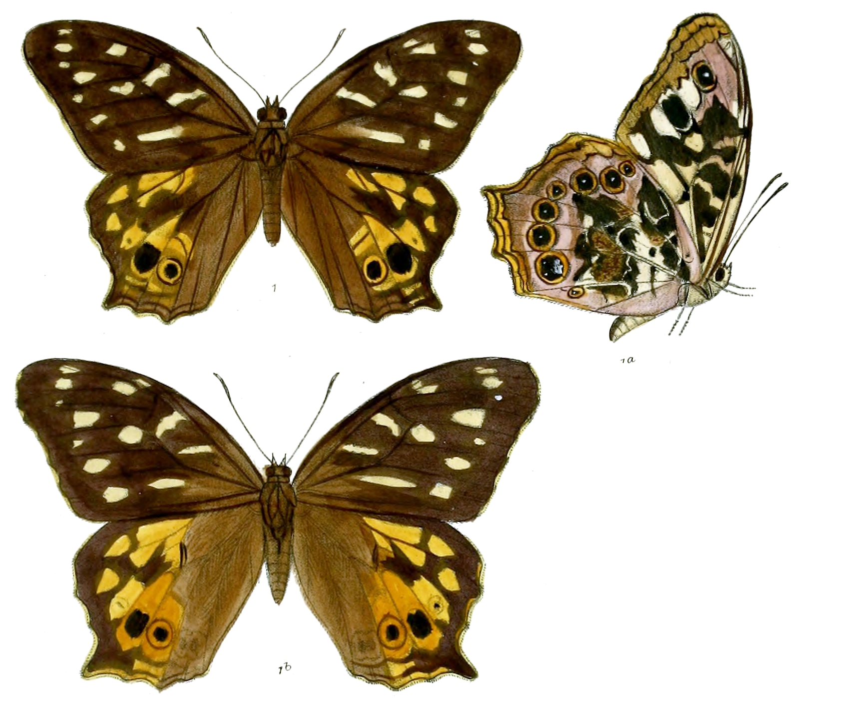 Blanaida bhadra = Neope bhadra